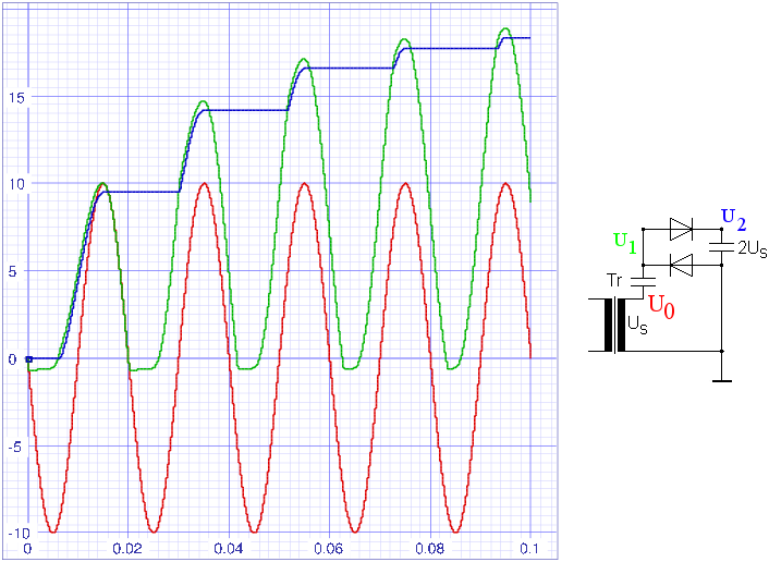 Spice3 Simulation der einfachen Villardschaltung (villard cascade).